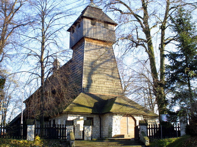 Drewniany kościół parafialny p.w. św. Marii Magdaleny o charakterze obronnym z końca XVI wieku. Zdjęcie mzopw